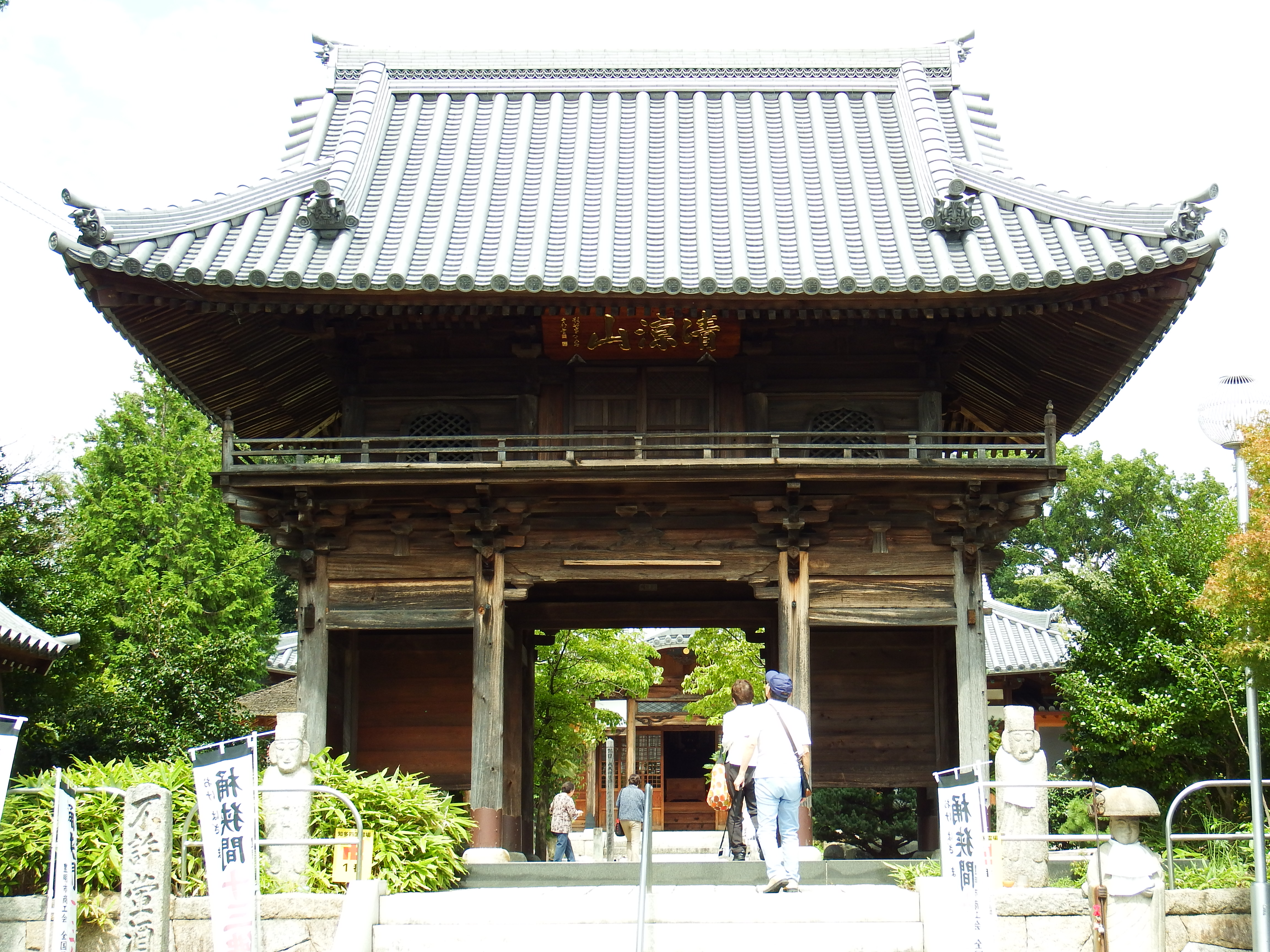 曹源寺山門